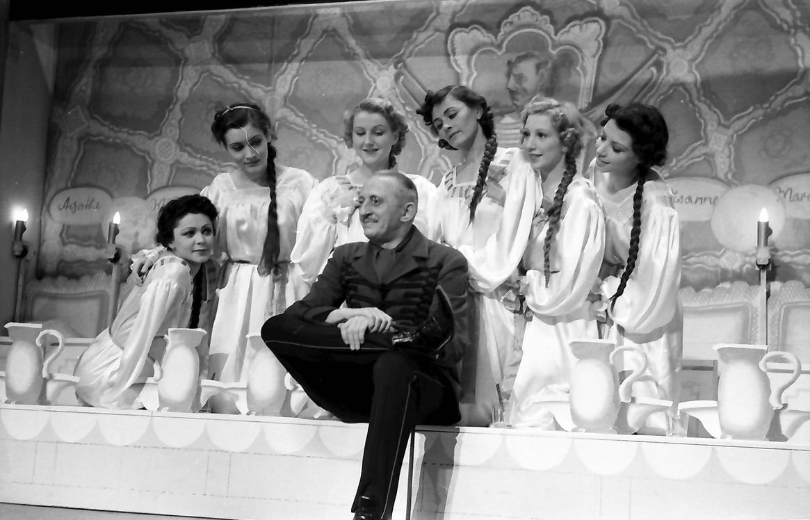 Kabarett der Komiker: Zehn Mädchen und kein Mann; in der Mitte „General“ Egon Brosig